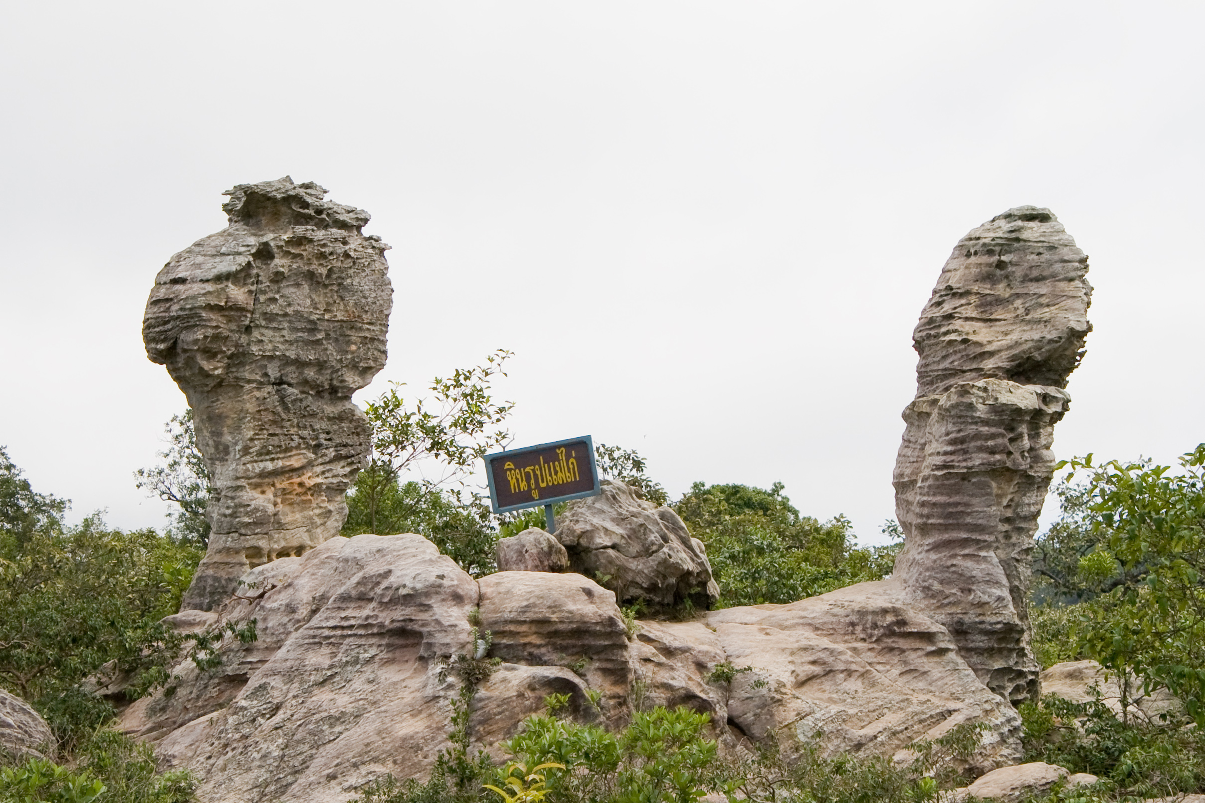 หินรูปแม่ไก่ ลานหินงาม อุทยานแห่งชาติป่าหินงาม